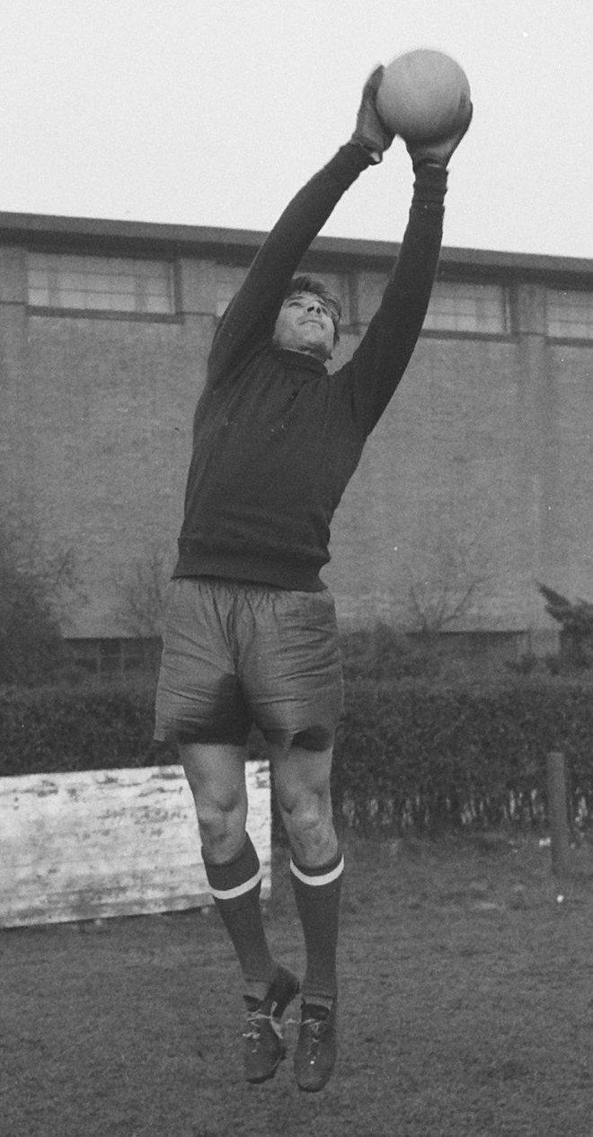 Russische voetballers training voor de wedstrijd tegen Feyenoord, keeper Yashin in actie